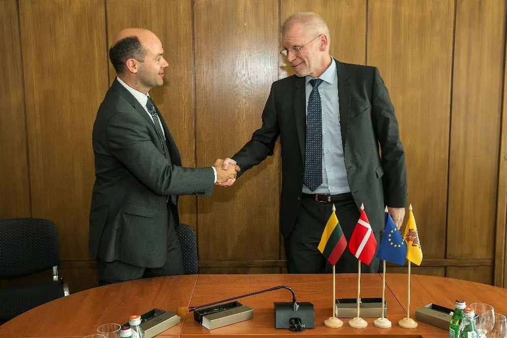 Derybos su strateginiais investuotojais